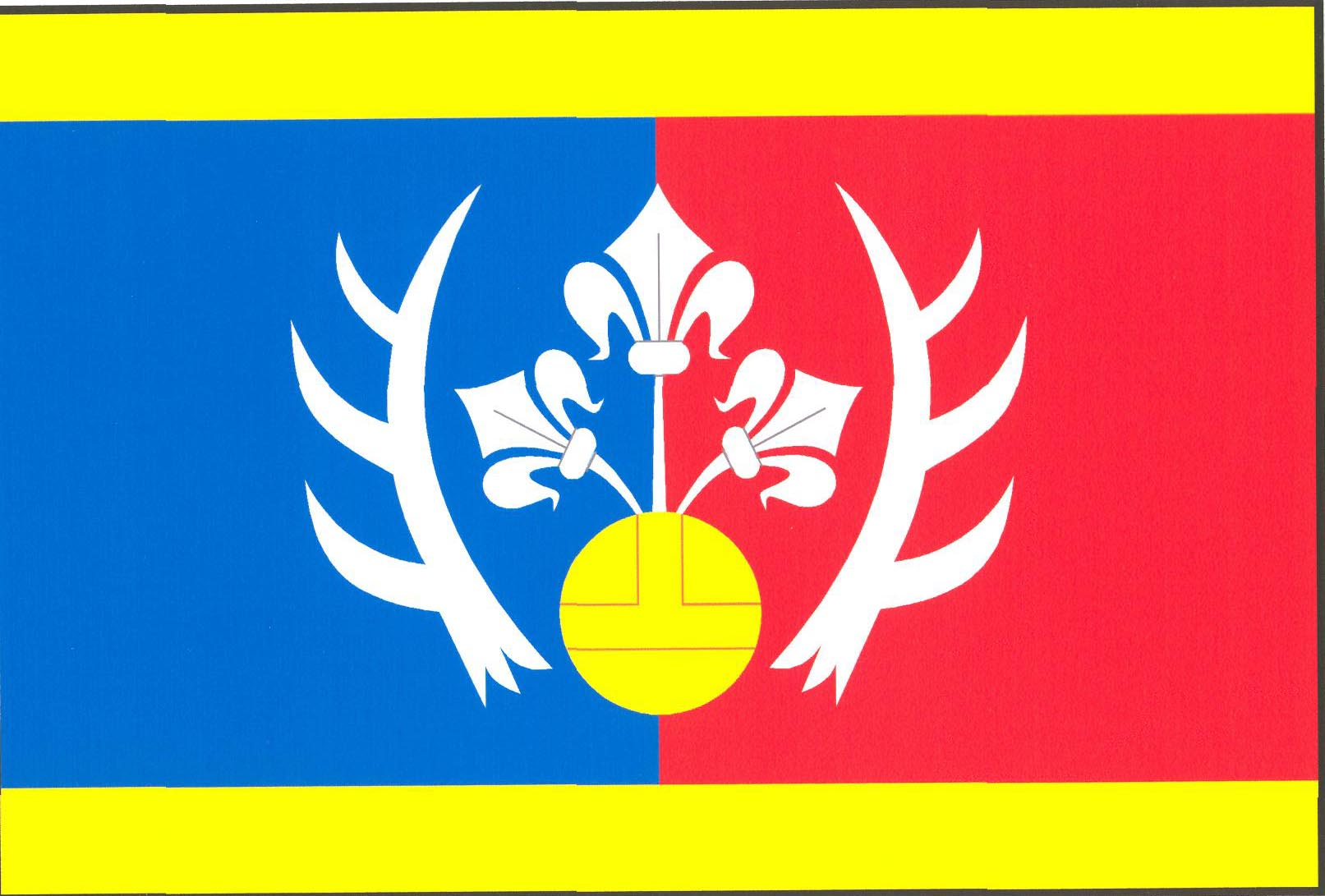 Vlajka obce Cizkrajov